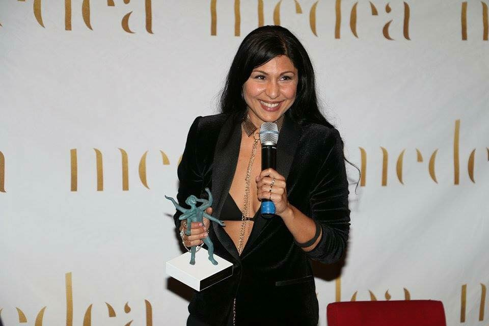 ندارد